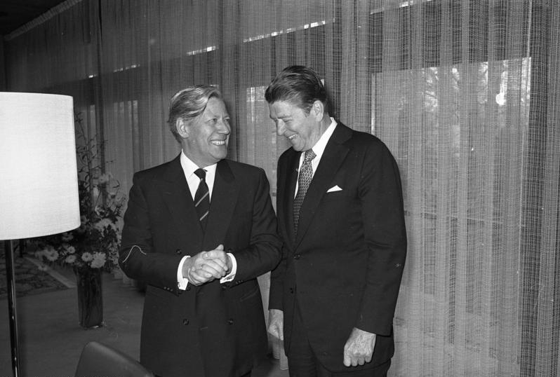 Bundeskanzler Helmut Schmidt und Ronald Reagan